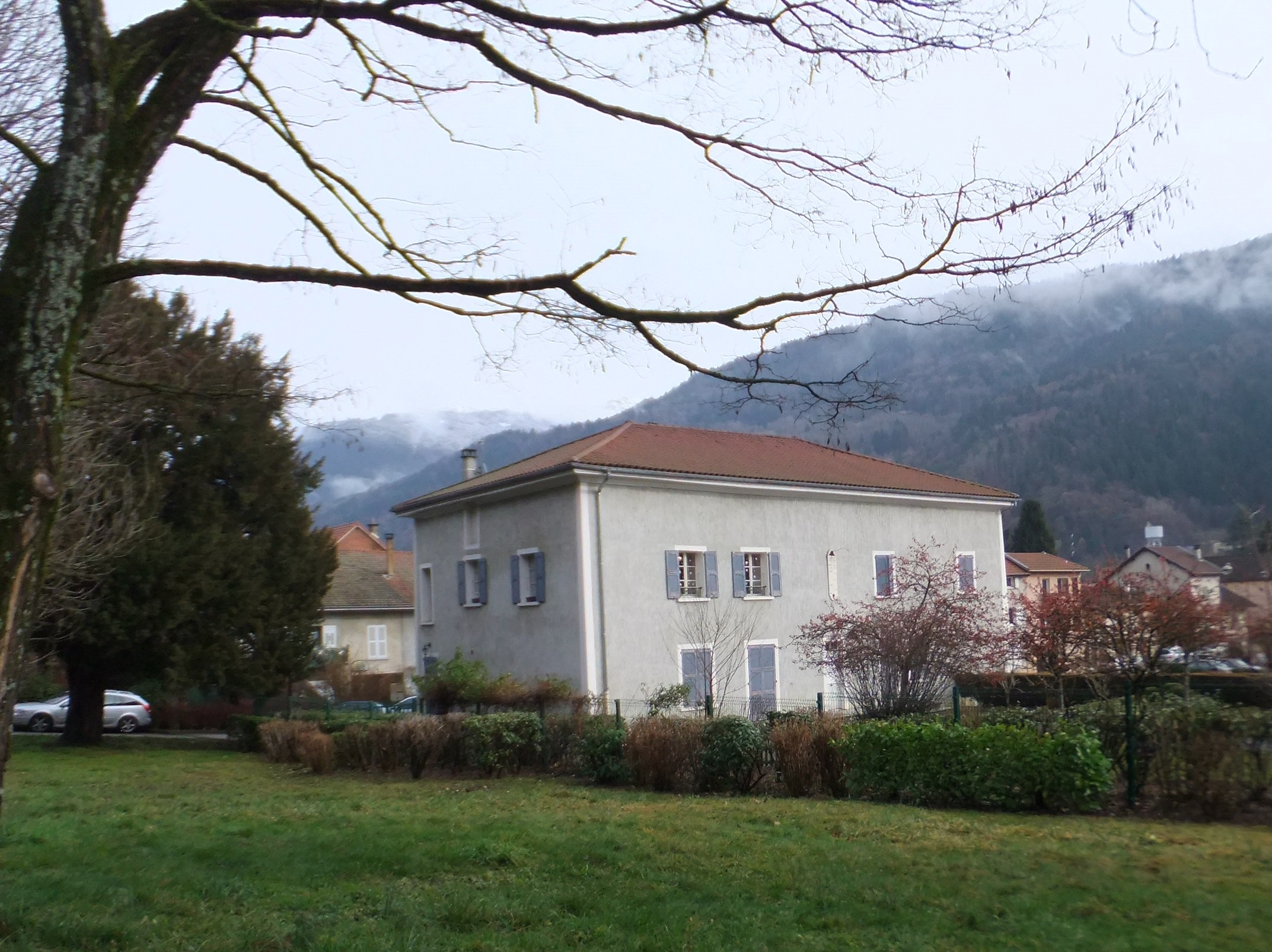 Demeure bourgeoise de la fin du XVIIIe, vue depuis son ancien parc, actuellement jardin public